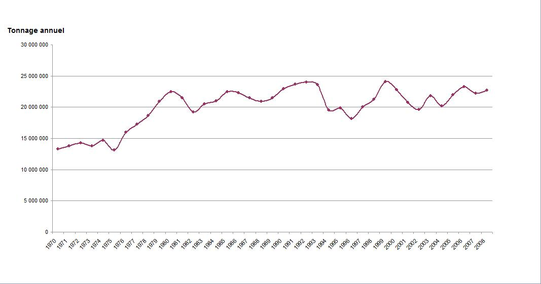 Statistiques de tonnage annuel traité par le Port de Rouen. Série de 1970 à 2008.